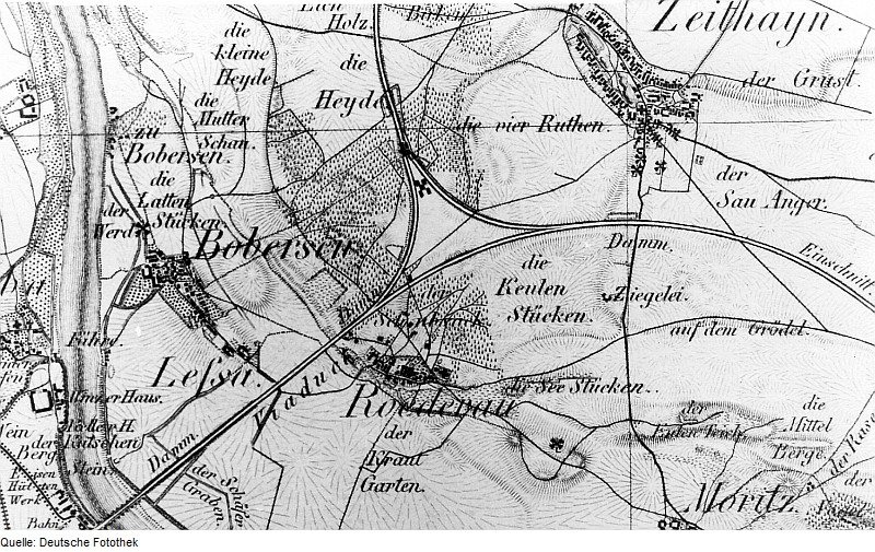 Original image description from the Deutsche Fotothek Zeithain-Röderau-Bobersen. Oberreit, Sect. Oschatz, 1839/40